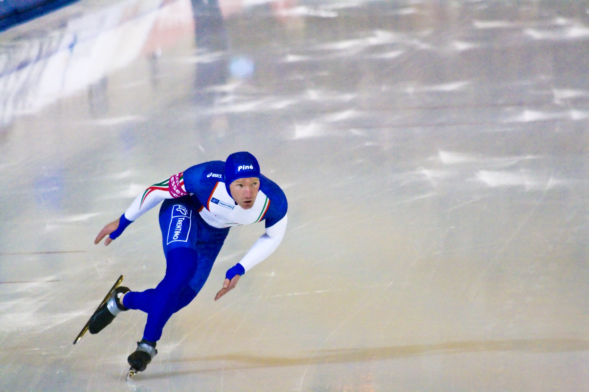 Ermanno Ioriatti, Team Italy